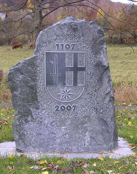 Gedenkstein